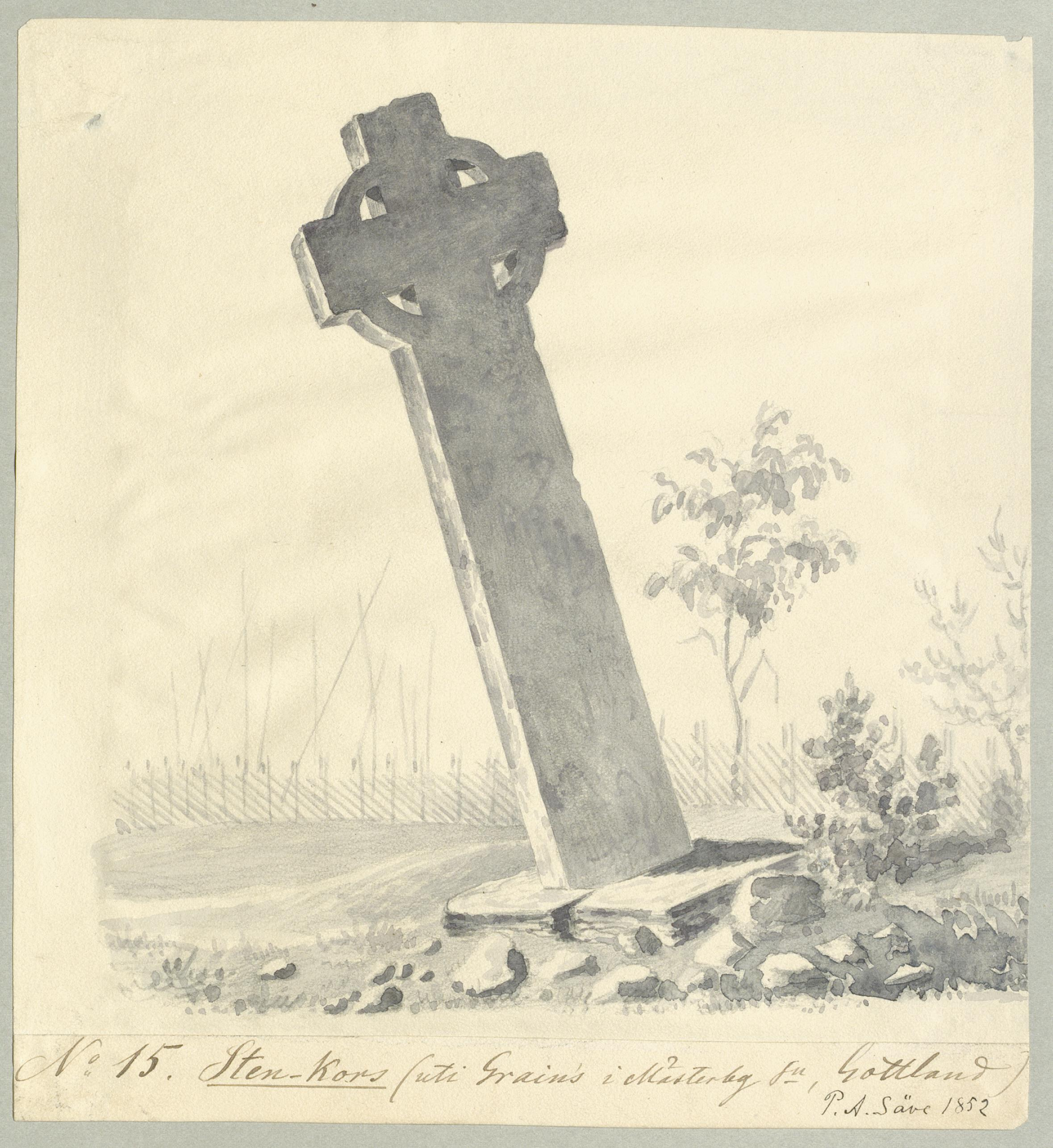 Kors av kalksten rest till minne av gotlänningarnas strid mot danskarna på platsen 1361. Teckning av Per Arvid Säve 1852. Mästerby 10:1